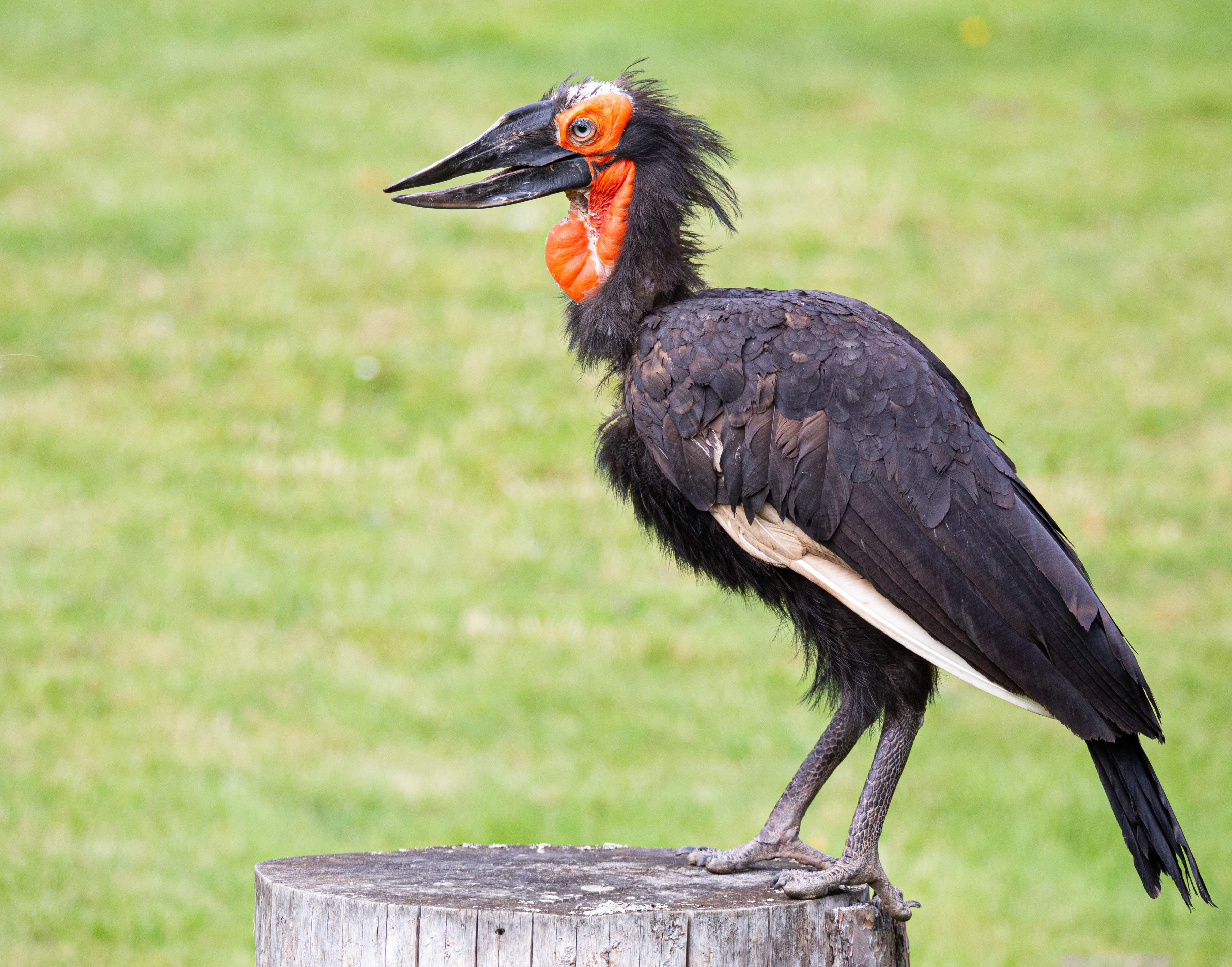 Bucorvus leadbeateri